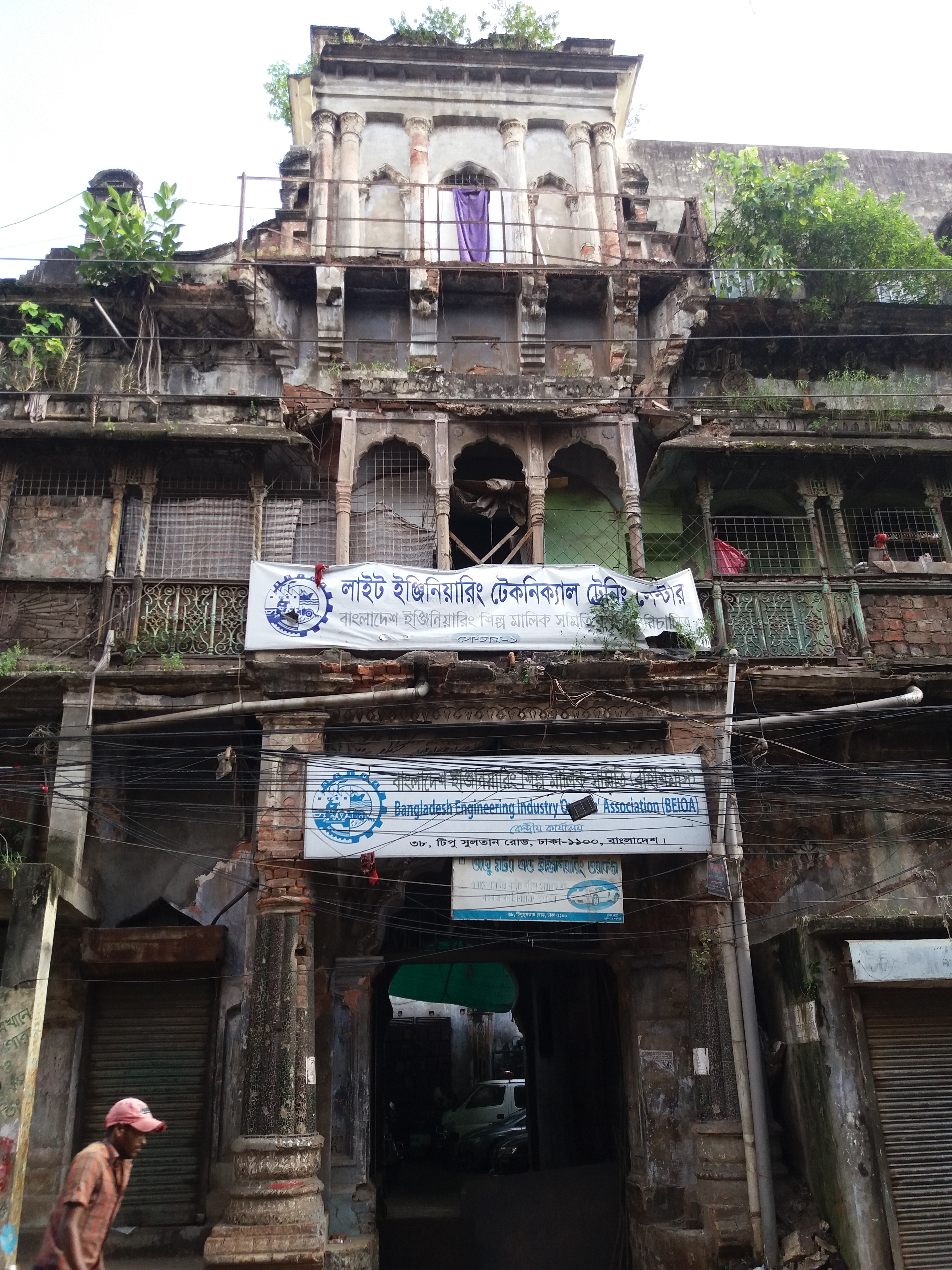 শঙ্খনিধি হাউজ এর সম্মুখভাগ